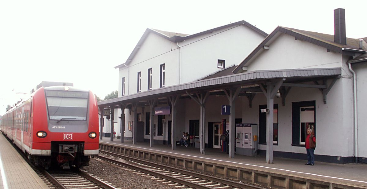 Motive rund um den Bf Geilenkirchen